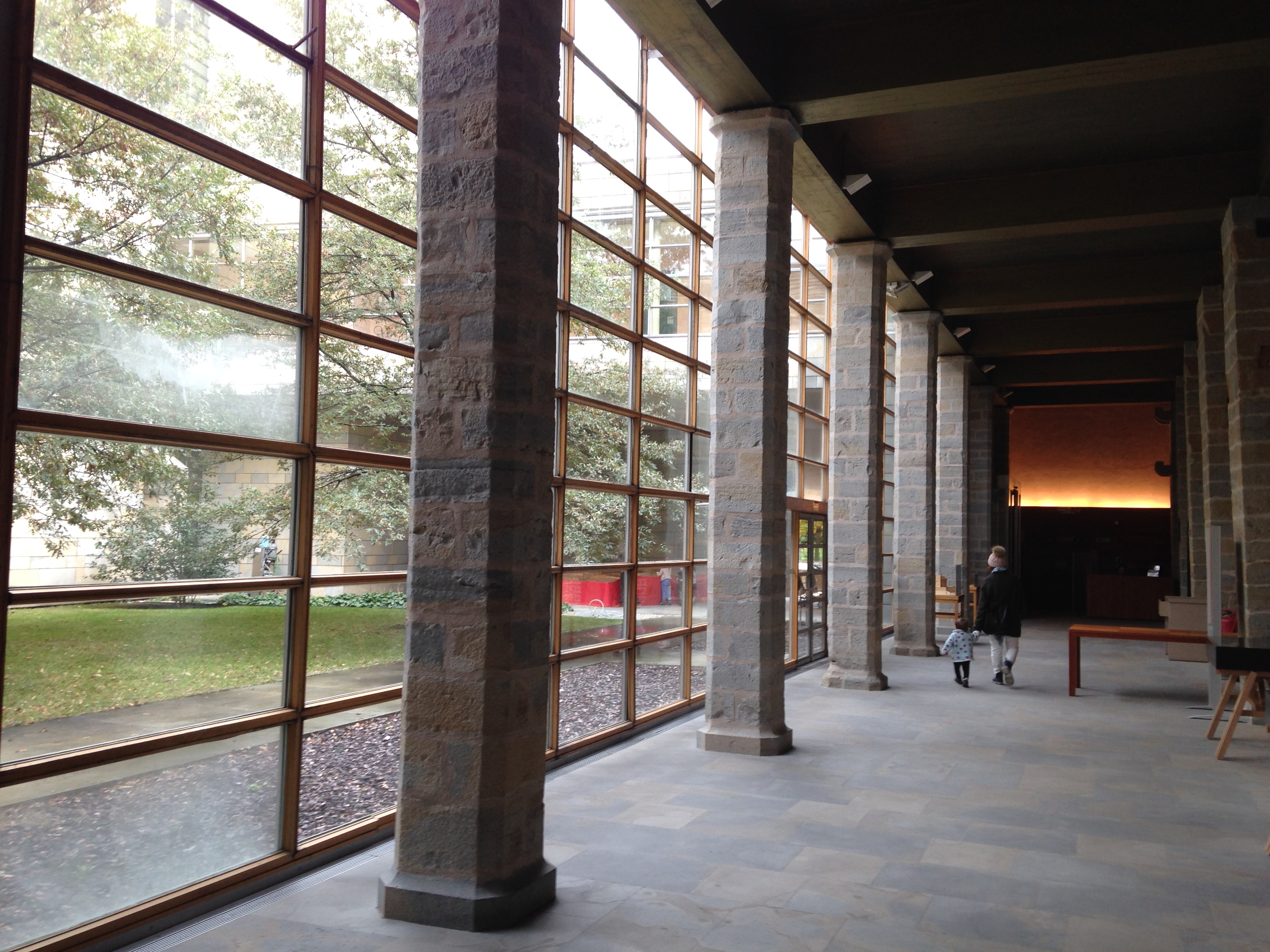 Nafarroako Errege jauregiko patio nagusiko galeria, barnetik ikusia